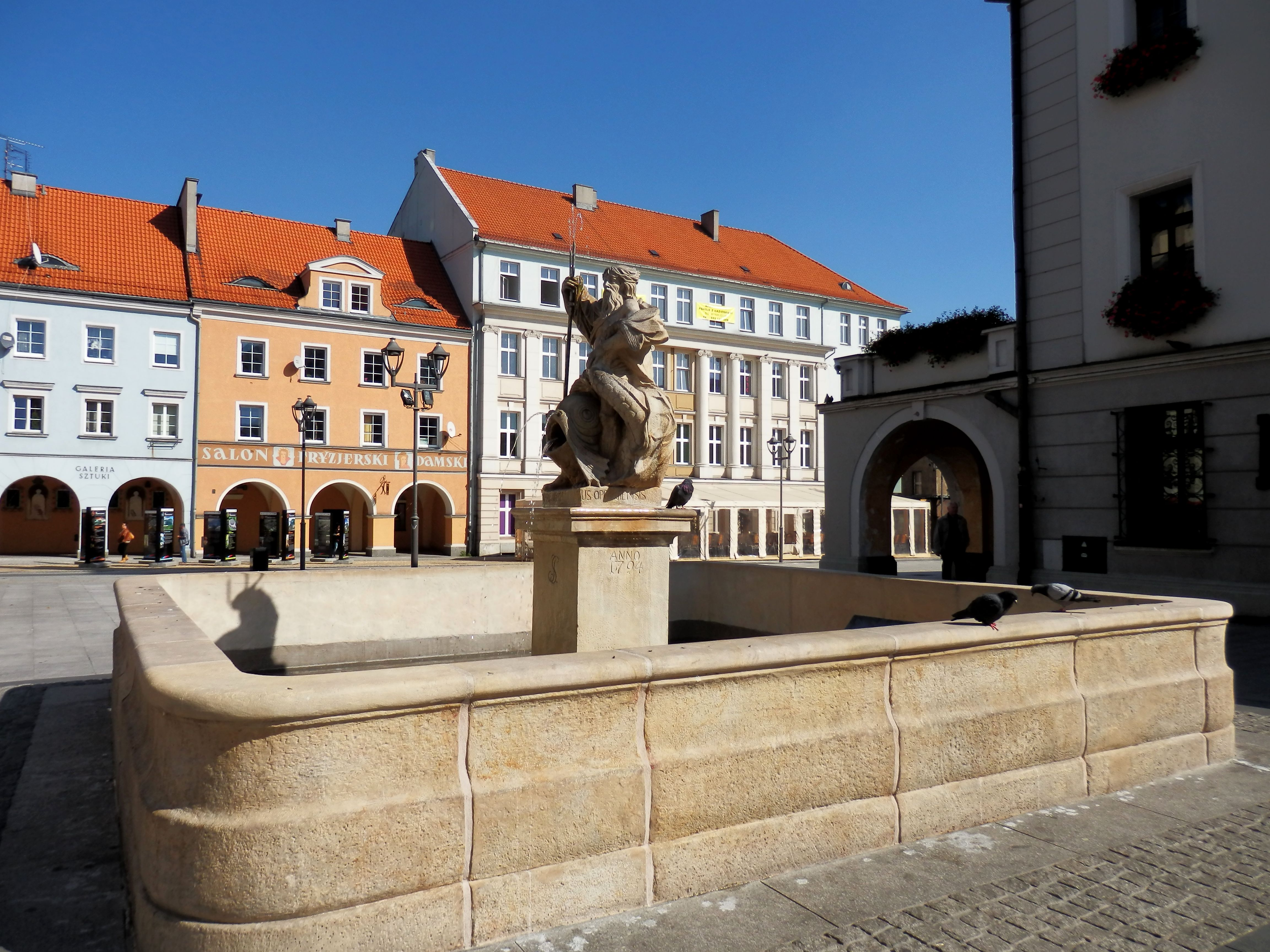 Gliwice, Fontanna z posągiem Neptuna, kamienna, wykonana przez J. Nitsche z Opawy w 1794 roku.